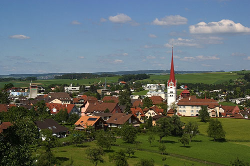 Beromünster (Nr. 03.1-5709)